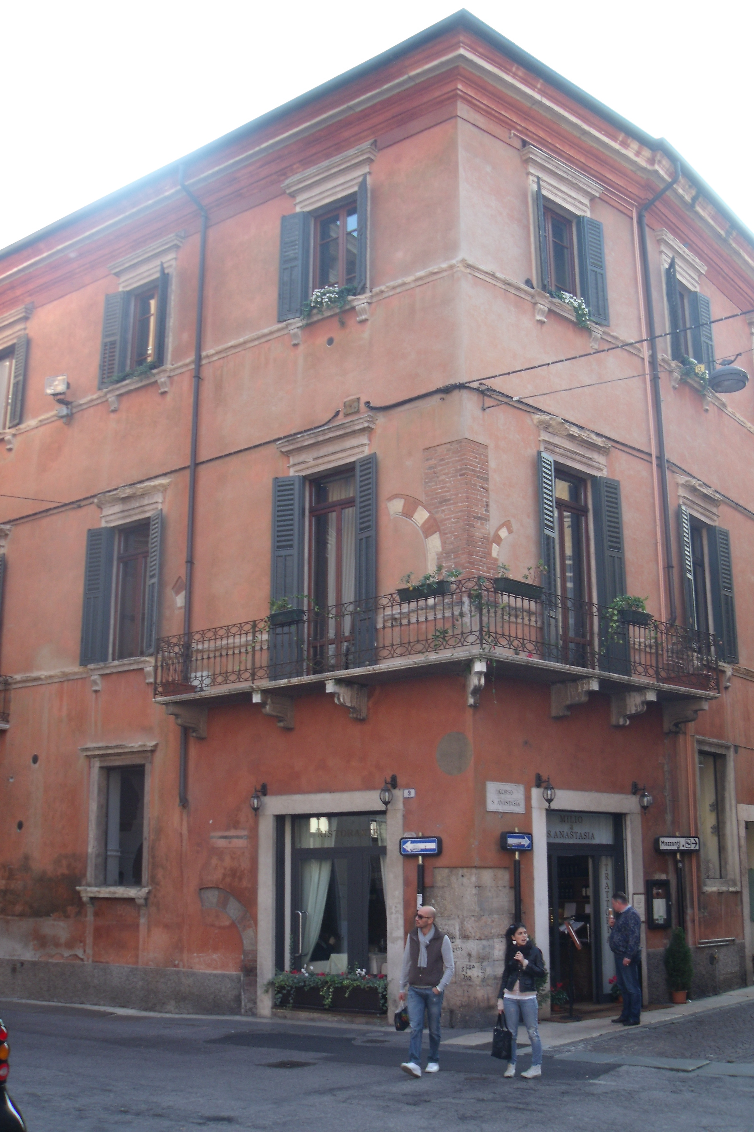 Il palazzo nella sua interezza si affaccia su due vie veronesi : S.Pietro Martire(sx in foto) e Corso Santa Anastasia(dx in foto)